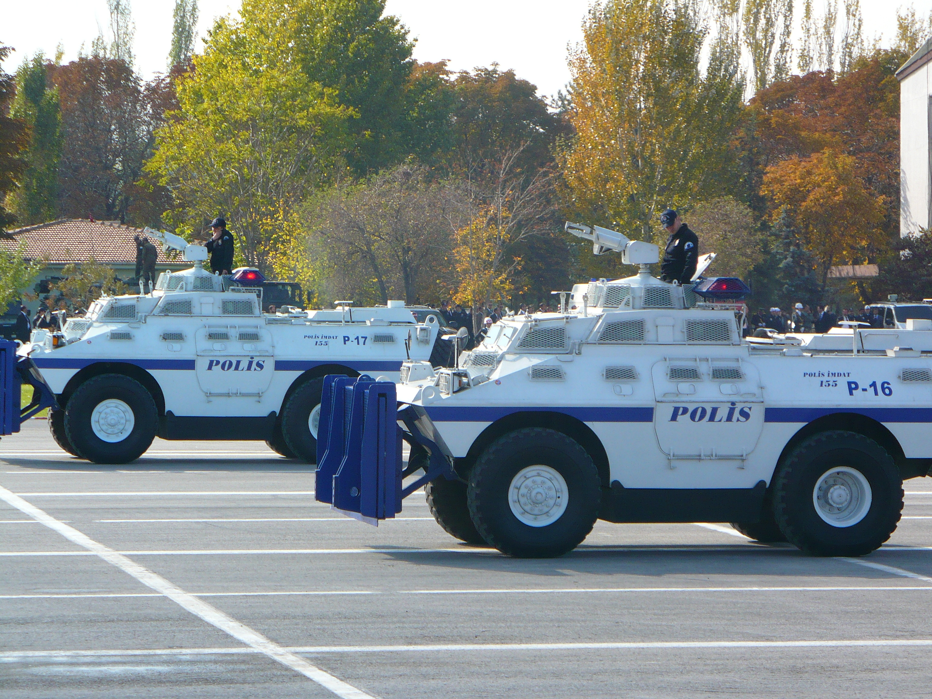 TOMA araçları